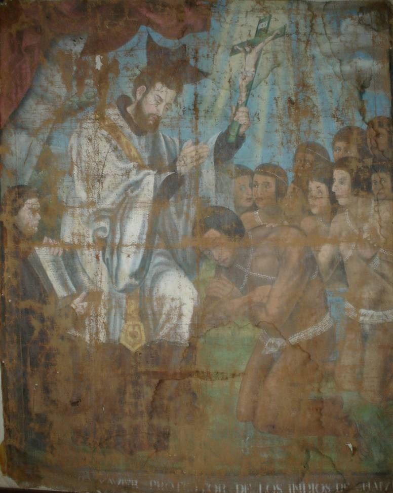 FRANCISCO JAVIER PROTECTOR DE LOS INDIOS DEL CHAMI 1783 MUSEO ELISEO BOLIVAR